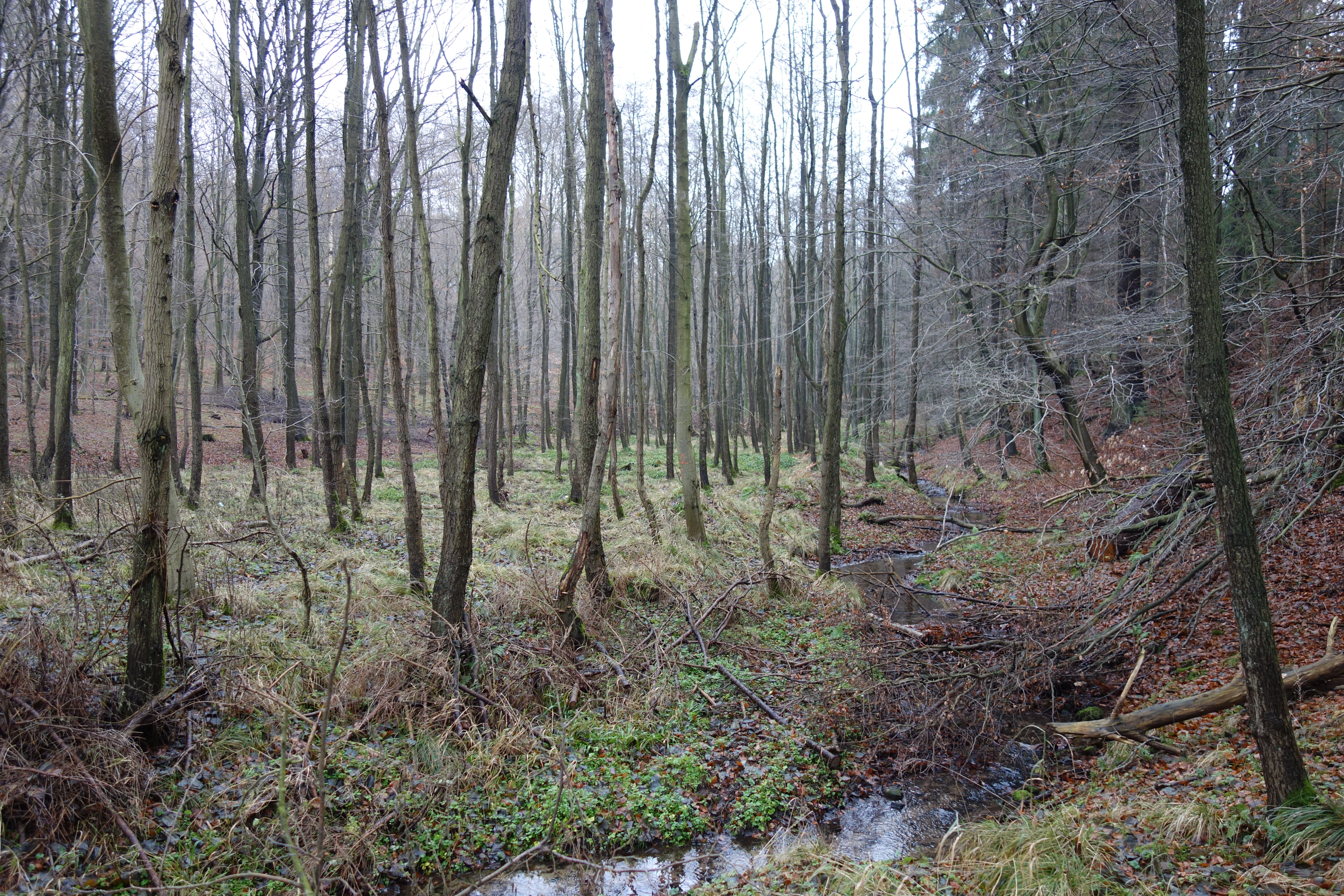 Naturschutzgebiet Klingelbachtal mit Erlen und Klingelbach von Höhe der Autobahnbrücke aufgenommen.